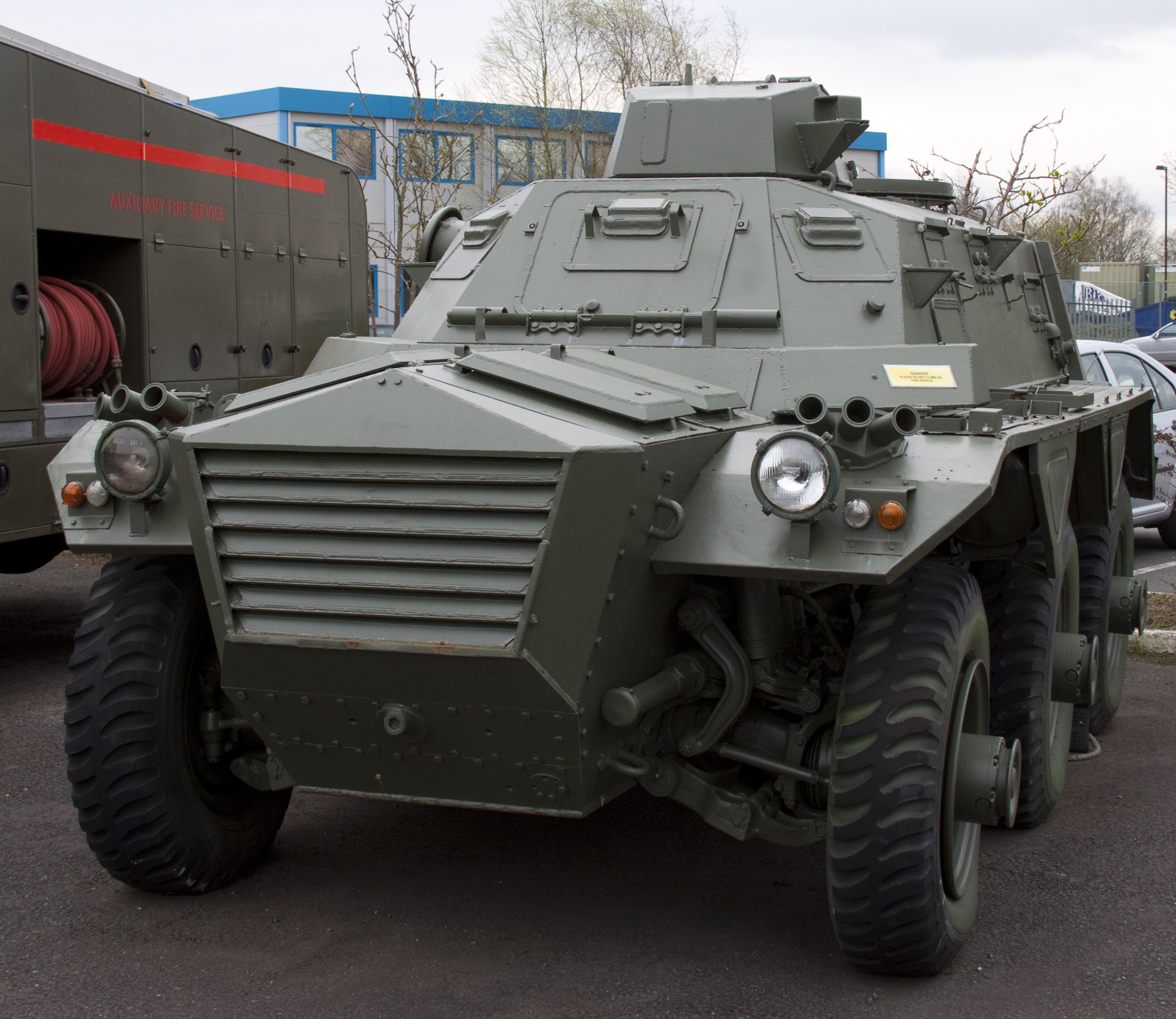 Alvis Saracen Personnel carrier